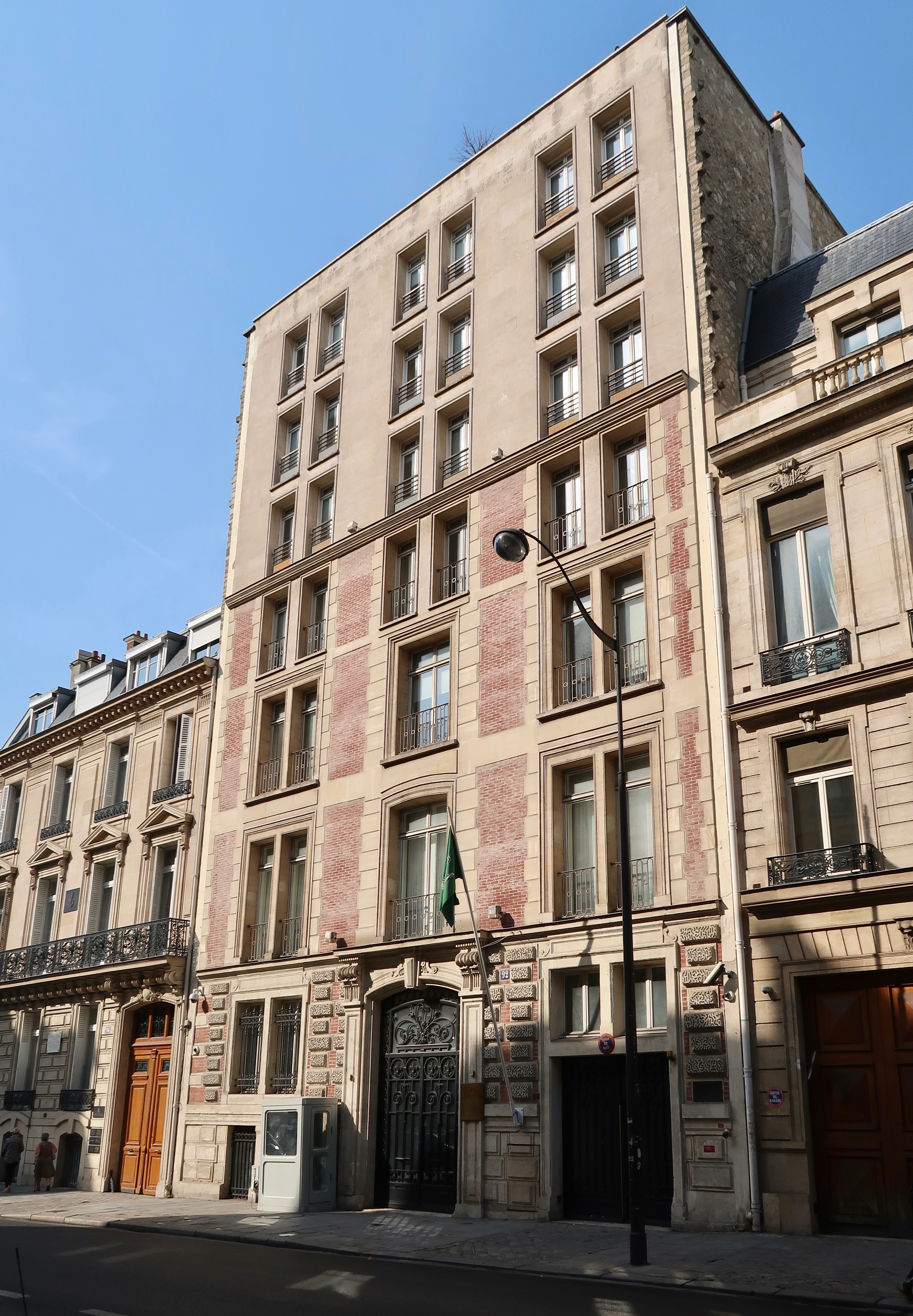 Ambassade d'Arabie saoudite en France, 92 rue de Courcelles (Paris, 8e).